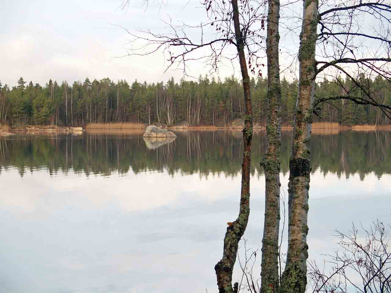 Haunisten allas